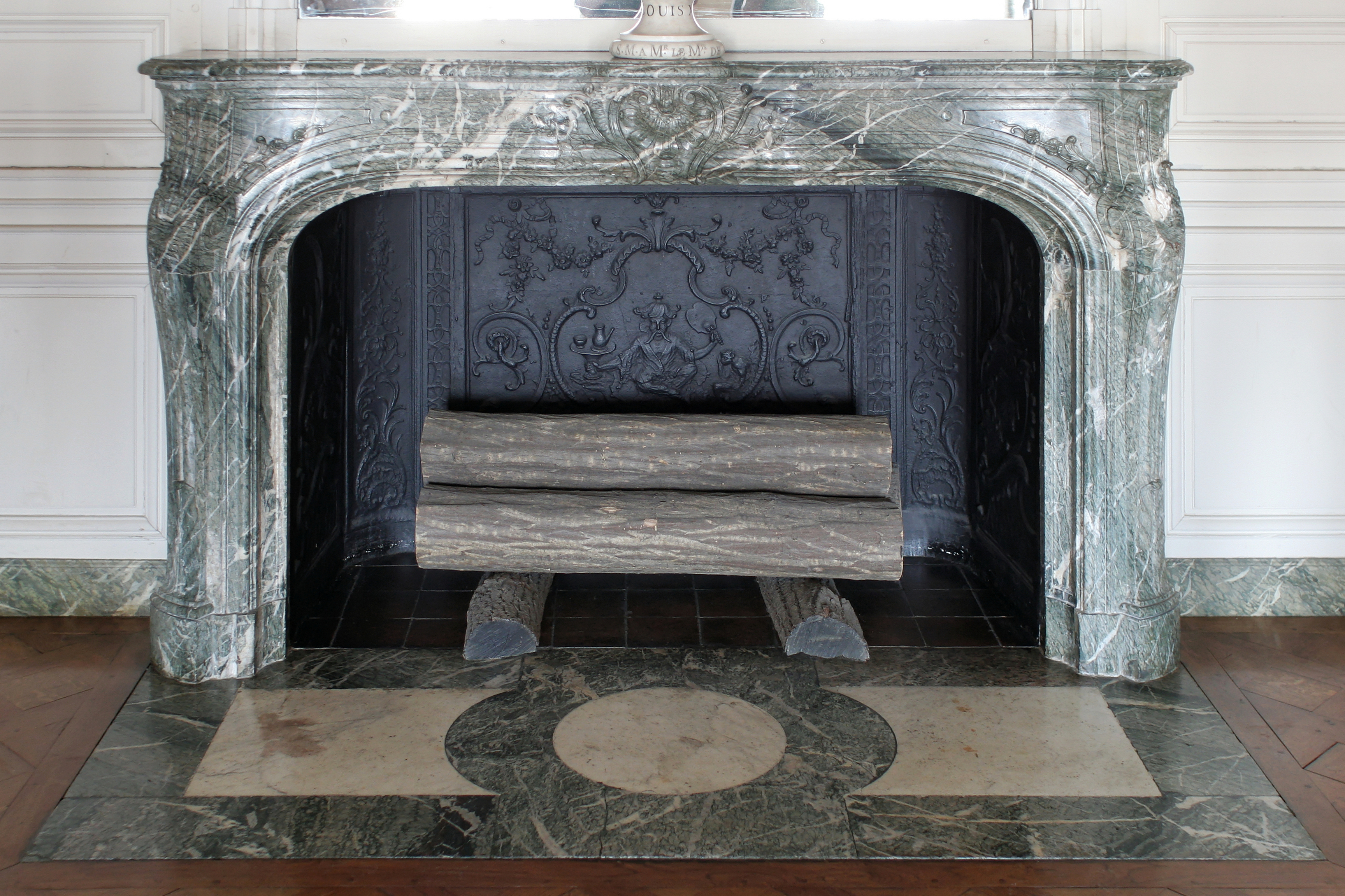 Château de Versailles, appartements du Dauphin et de la Dauphine, seconde antichambre du Dauphin. Cheminée en marbre vert de Campan (Hautes-Pyrénées).